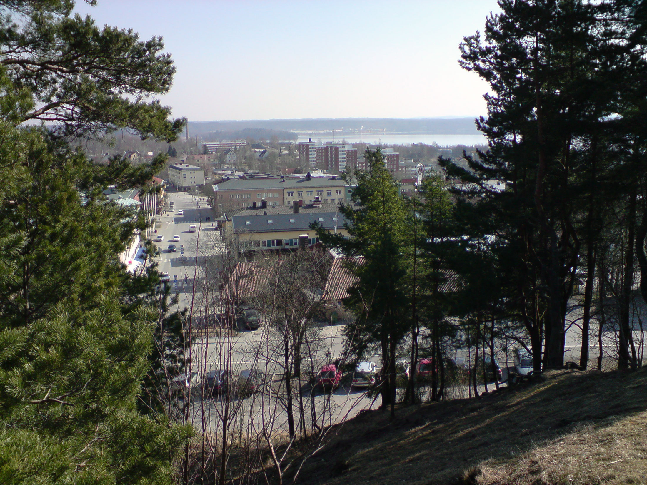 View of Karlskoga, Sweden